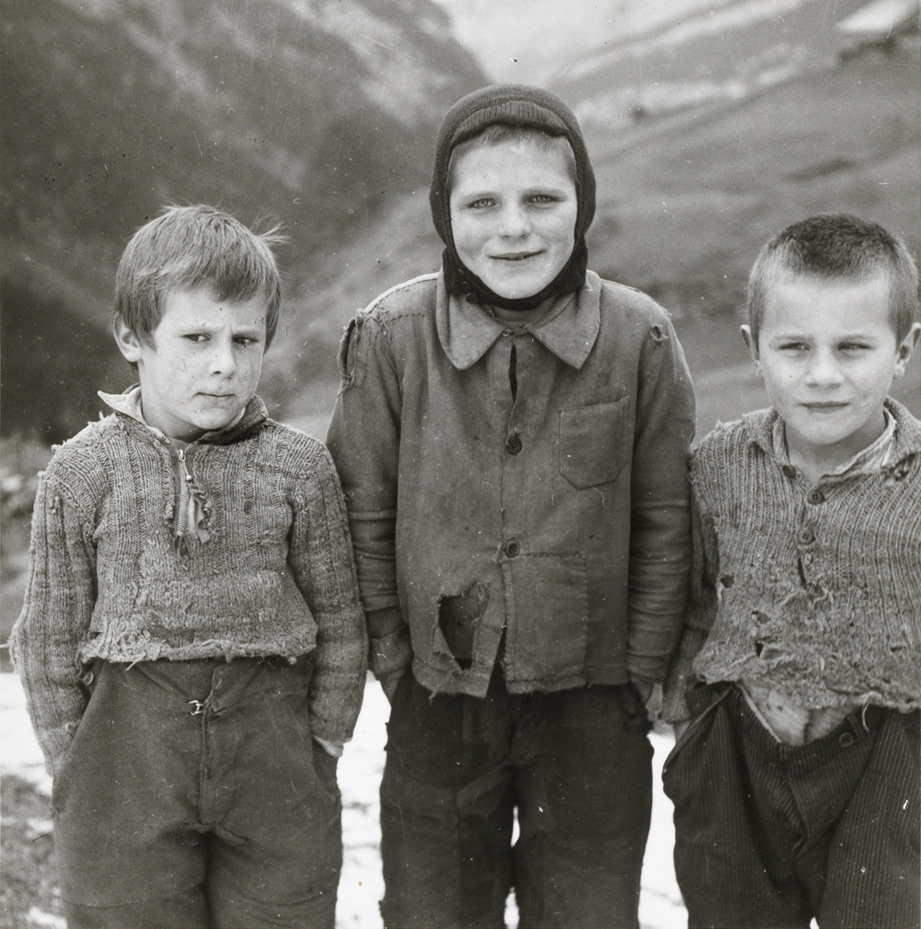 Winterhilfe Schweiz - Hilfe vor 60 Jahren für Kinder